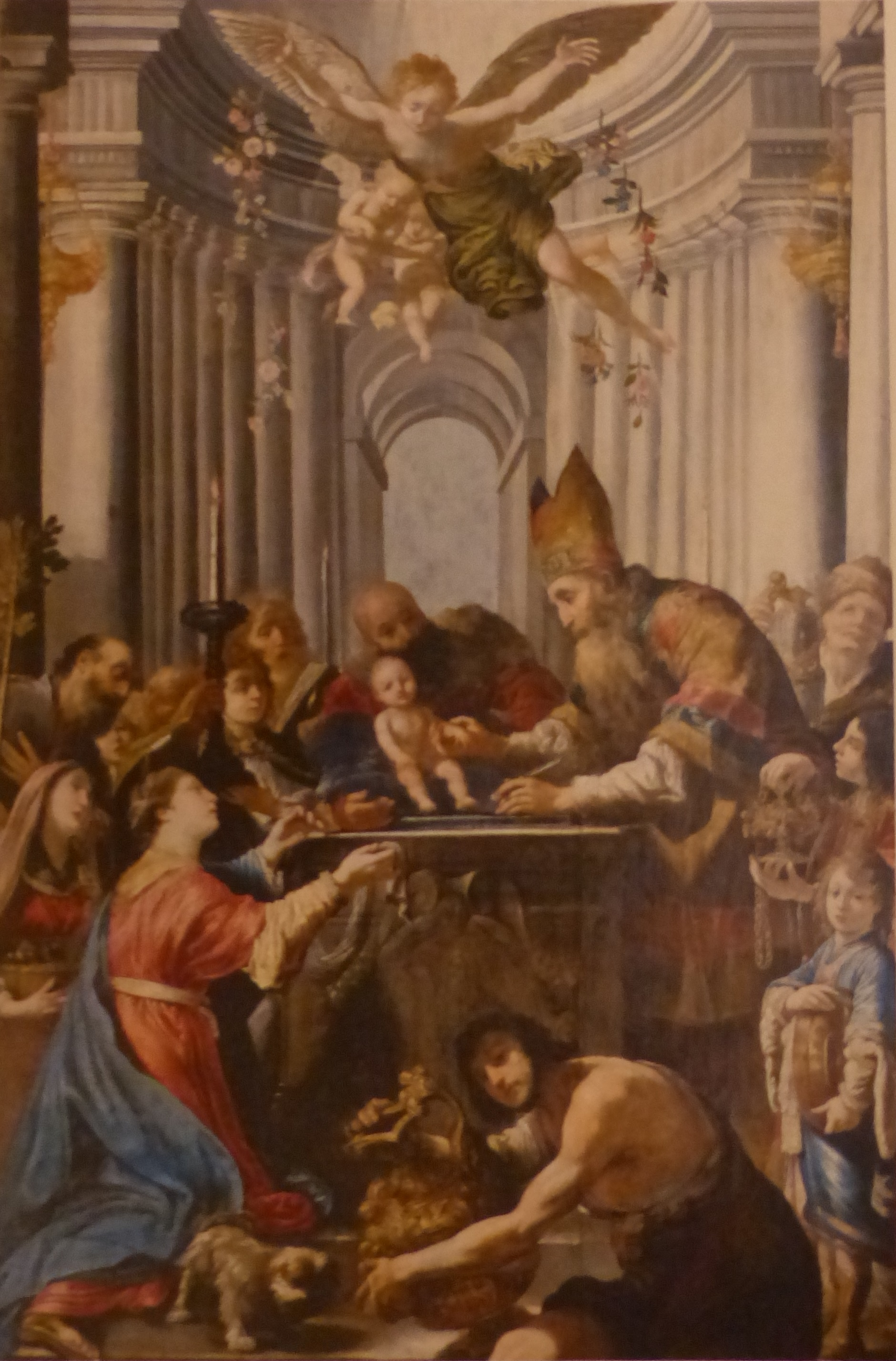 « La Circoncision », huile sur toile de Claude Vignon, 1627. Tableau exposé au prieuré de Saint-Martin des Champs à Paris, puis dans la primatiale Saint-Jean de Lyon.